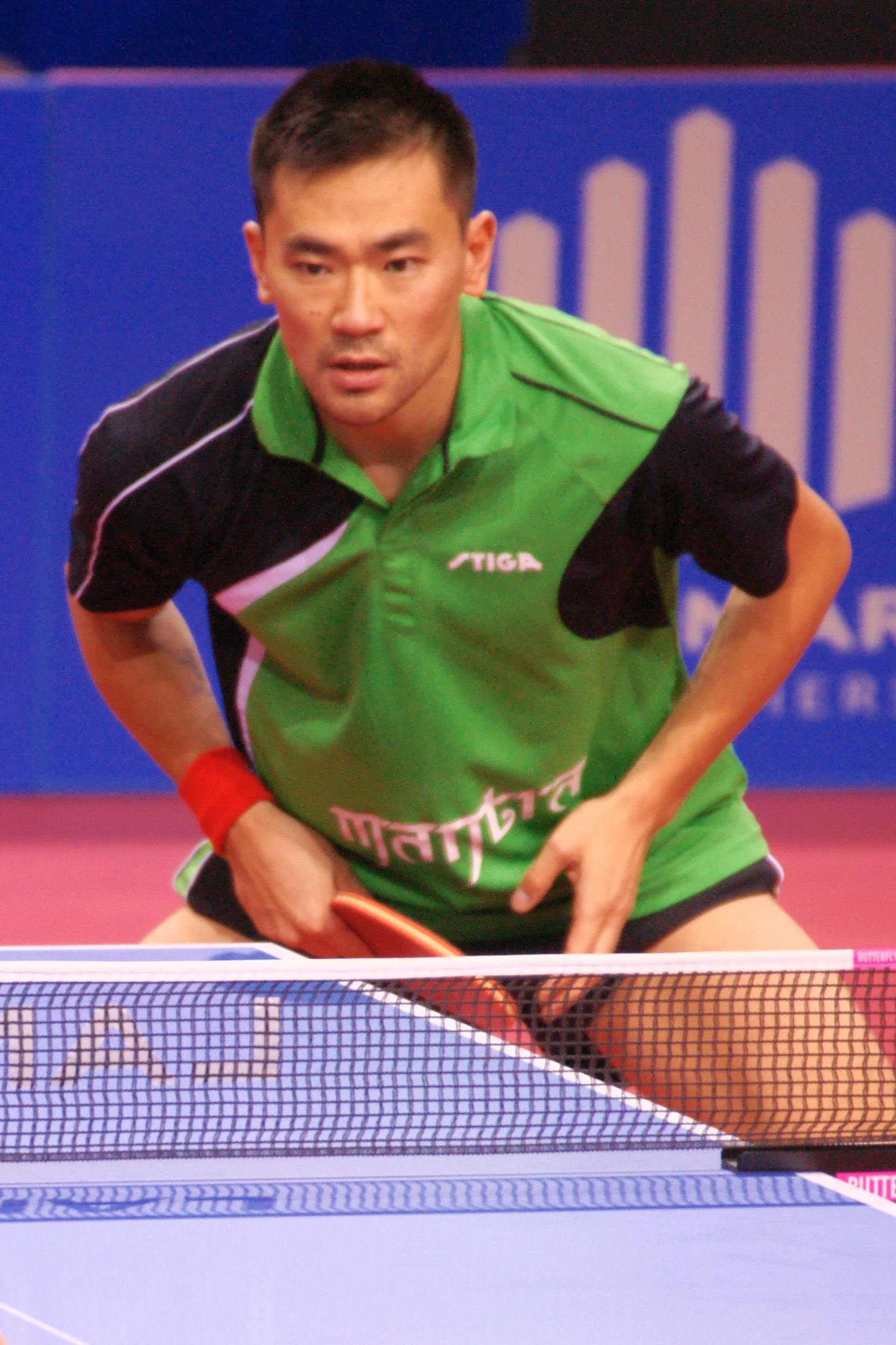 Kou Lei, Top 16 Antibes 2017